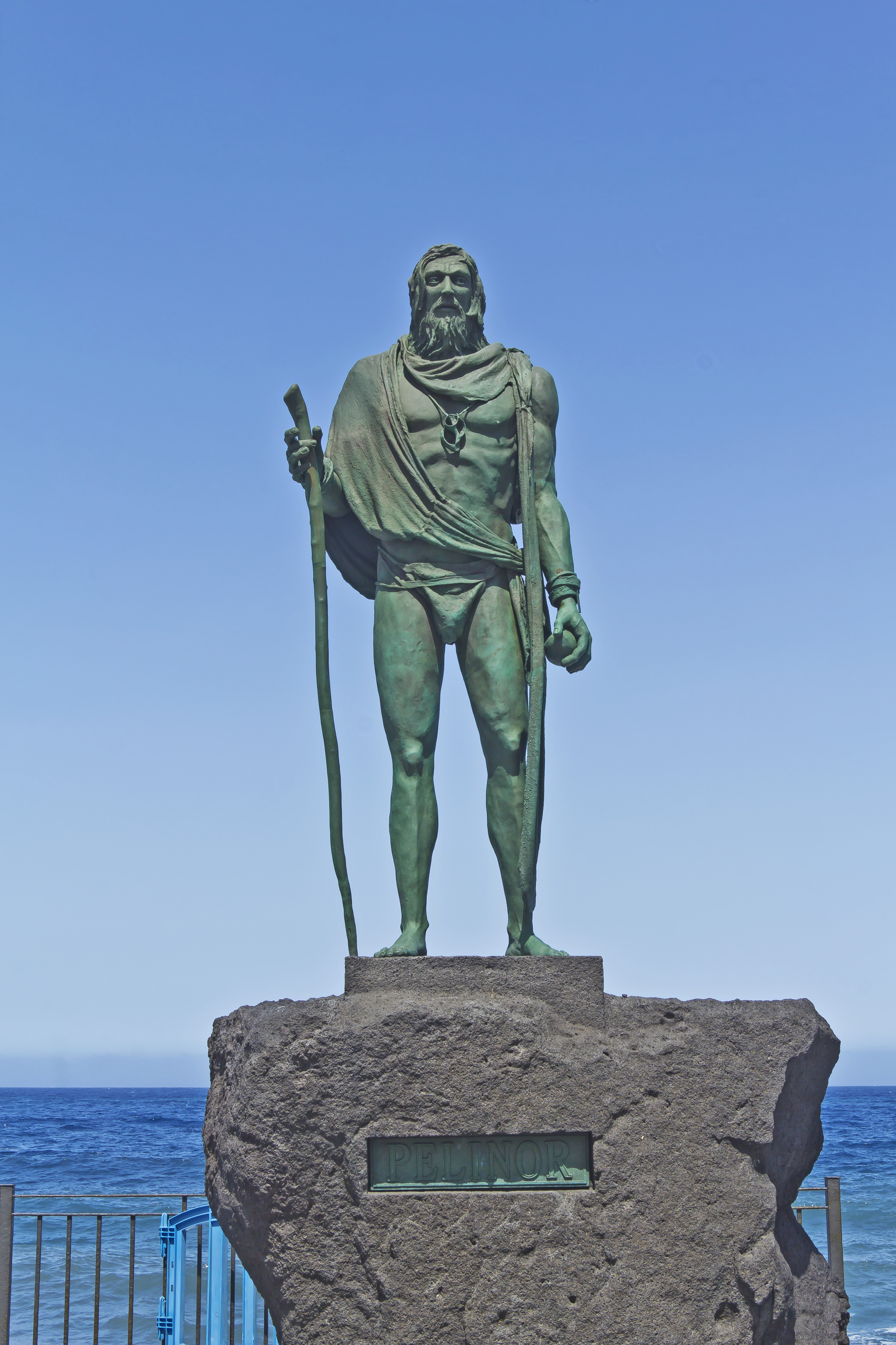 Die Plastik des Mencey Pelinor auf der Plaza de la Patrona de Canarias in Candelaria, Teneriffa, Spanien wurde von José Abad geschaffen